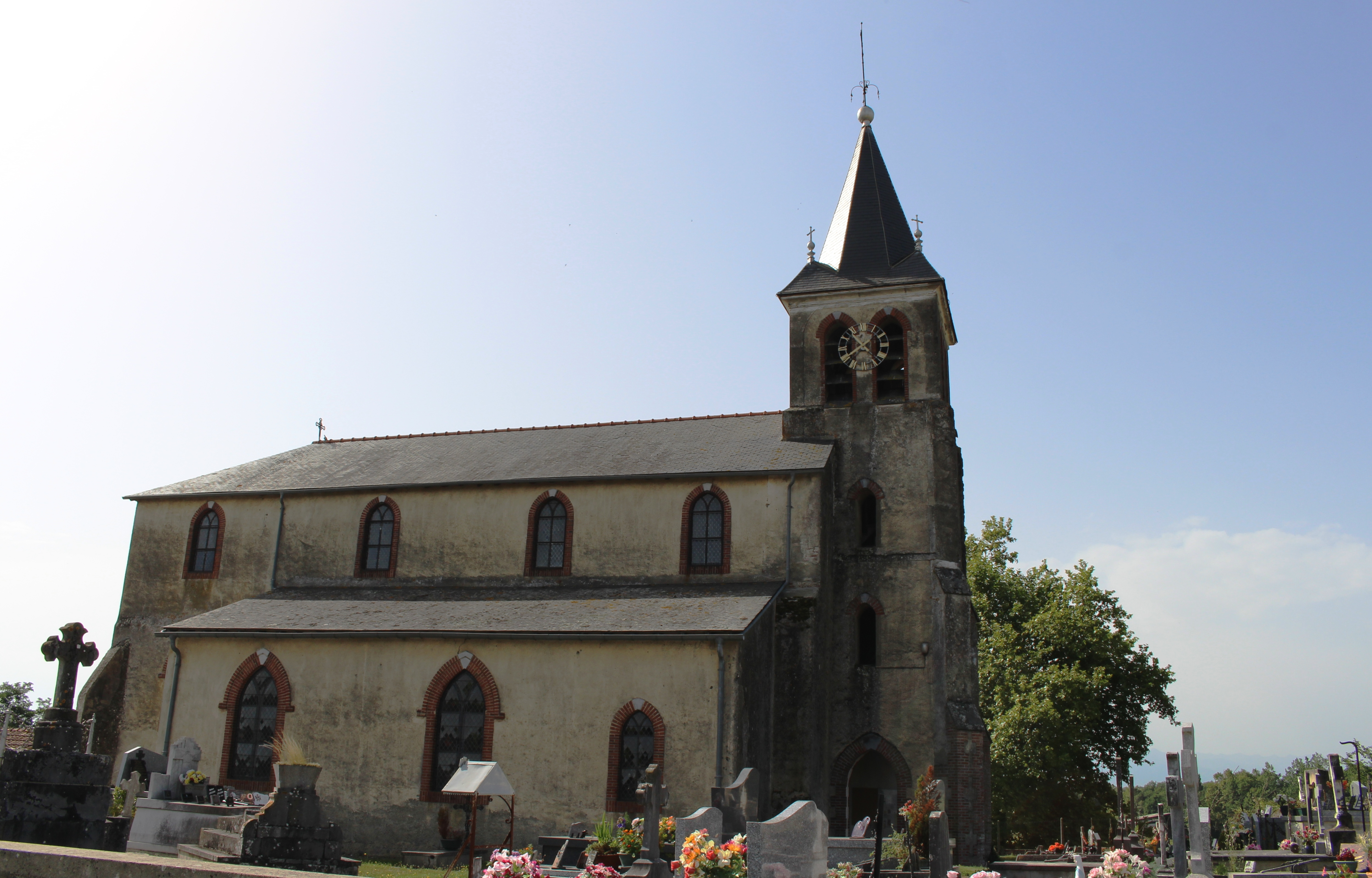 Église Saint-Martin de Siarrouy (Hautes-Pyrénées)